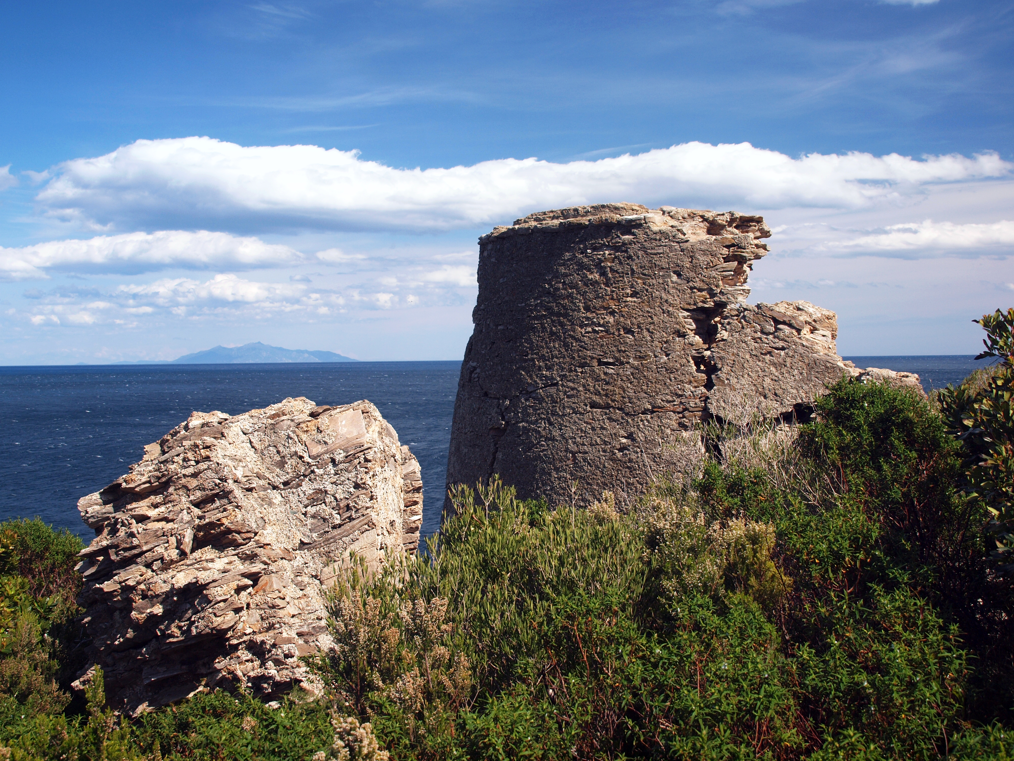 Brando, Cap Corse (Corse) - Tour ruinée de Sagro. Sur l'horizon, l'île d'Elbe